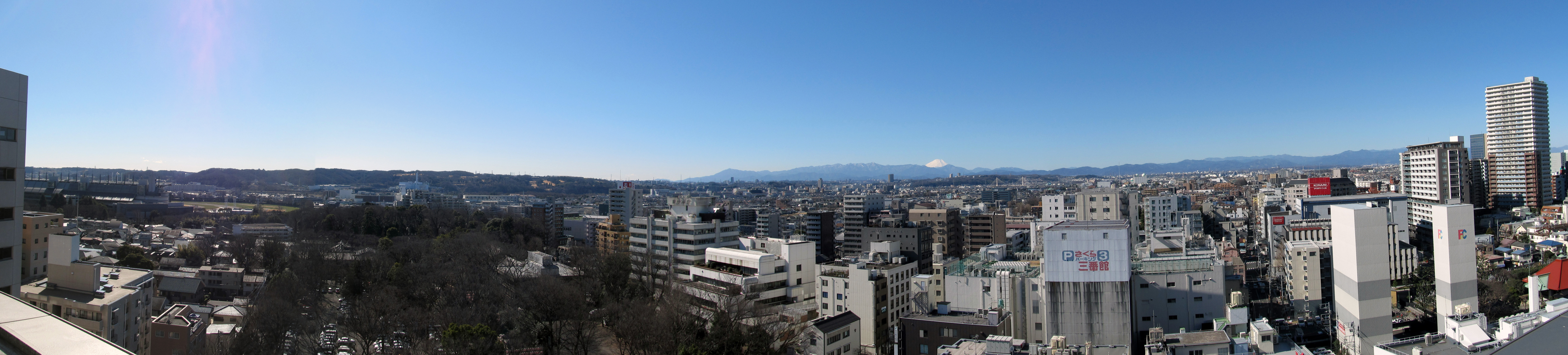 東京都府中市から富士山方向2017